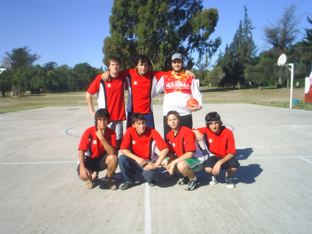 28 de Noviembre de 2008.